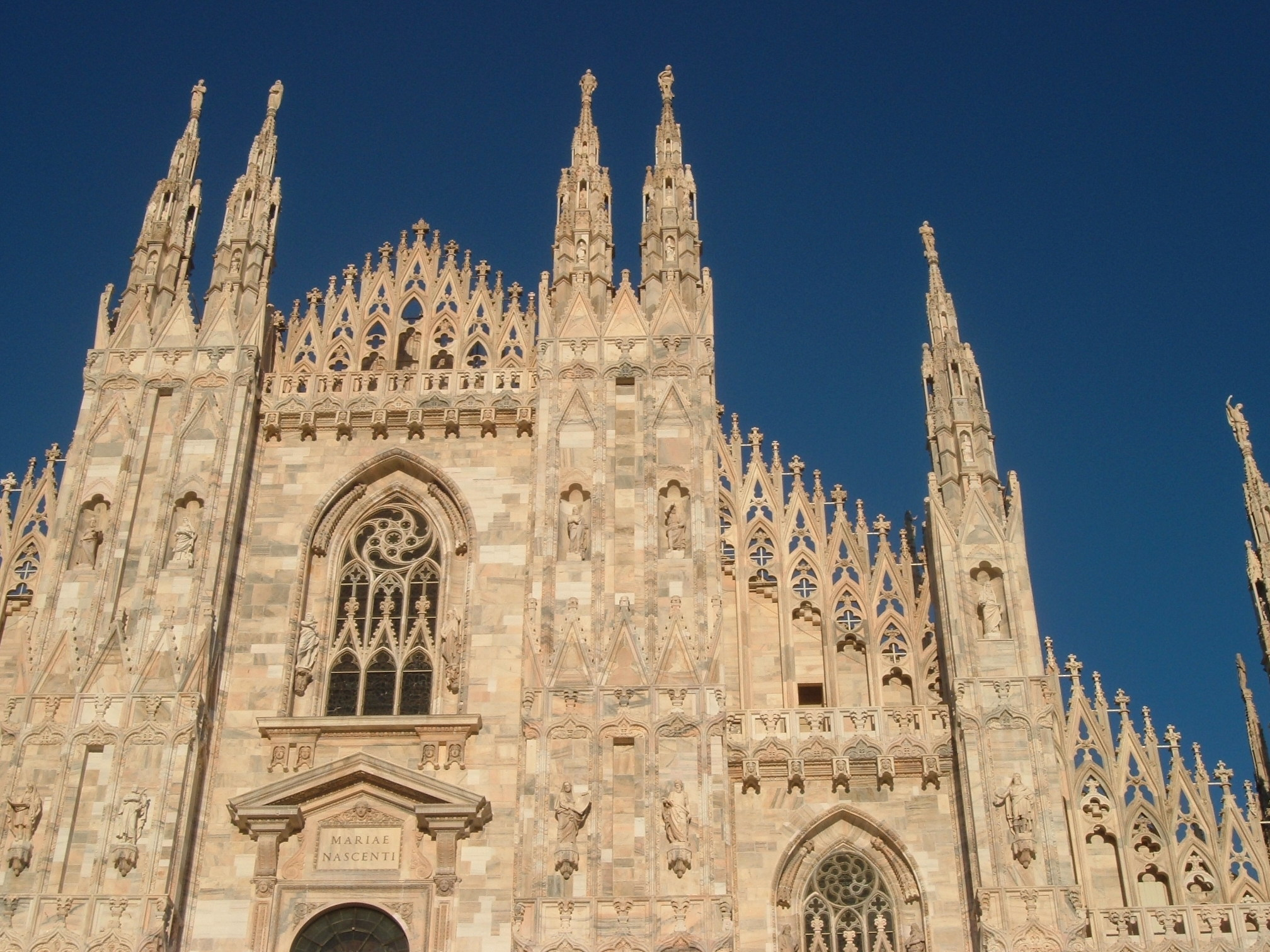 Particolare della facciata del Duomo di Milano dopo il restauro